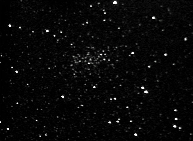 NGC 6802